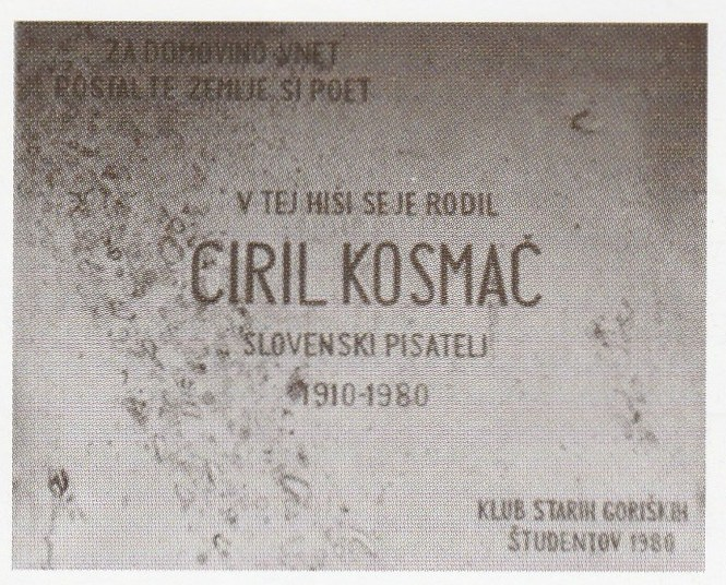 Spominska plošča na Kosmačevi domačiji.